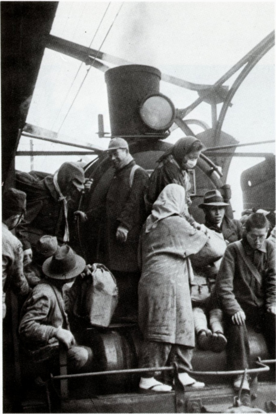 「機関車の前頭部にも乗った旅客」、人物を見ると、Image:Buying train at Nippori Station.jpgと前後して撮られた写真のようで、そのため撮影場所は日暮里駅と思われる。